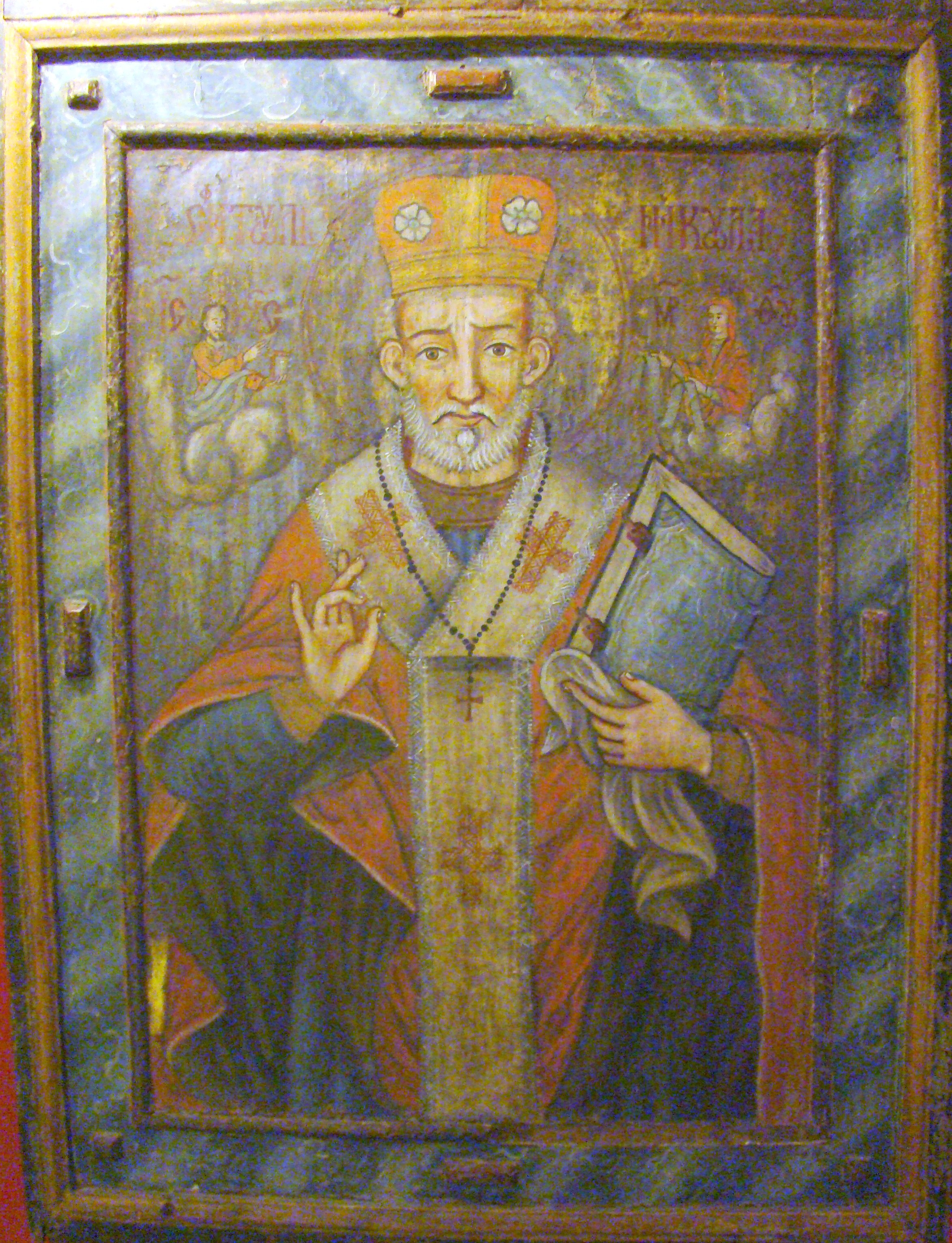 Icoană care a aparținut bisericii de lemn din Rebrișoara